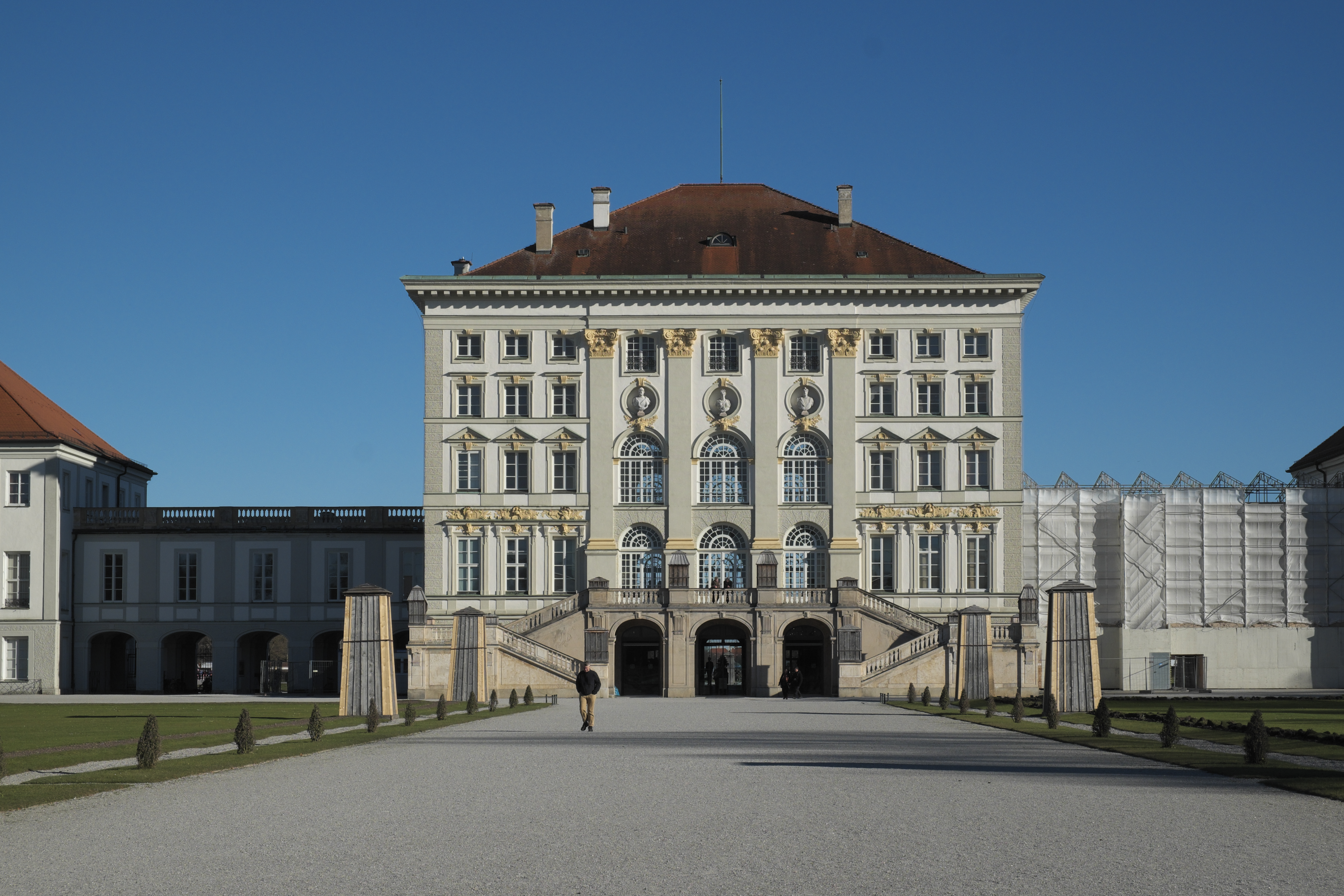 Schlosspark Nymphenburg im Stadtbezirk Neuhausen-Nymphenburg in München (Bayern/Deutschland)